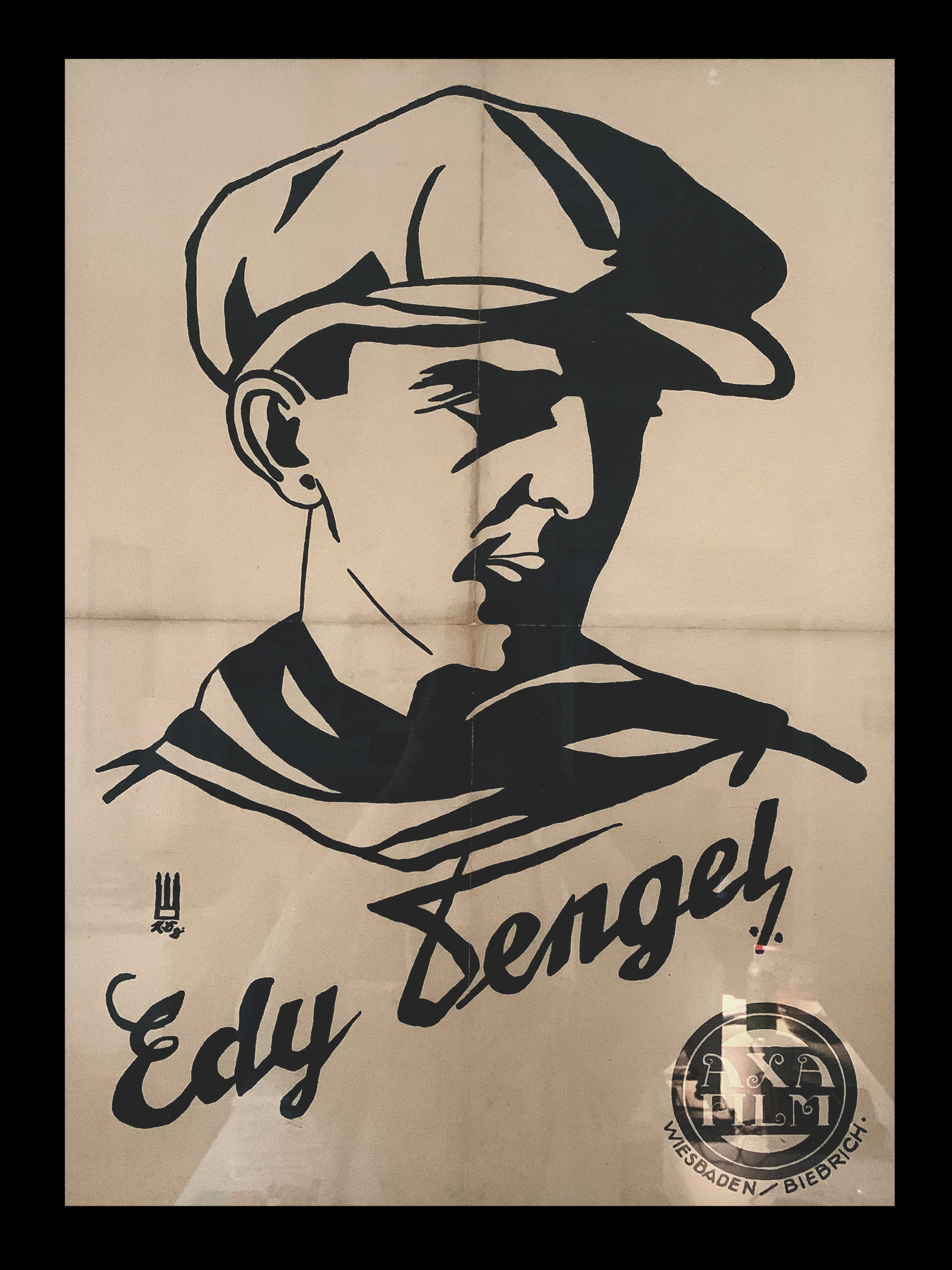 Plakat, Portrait von Edy Dengel, um 1922